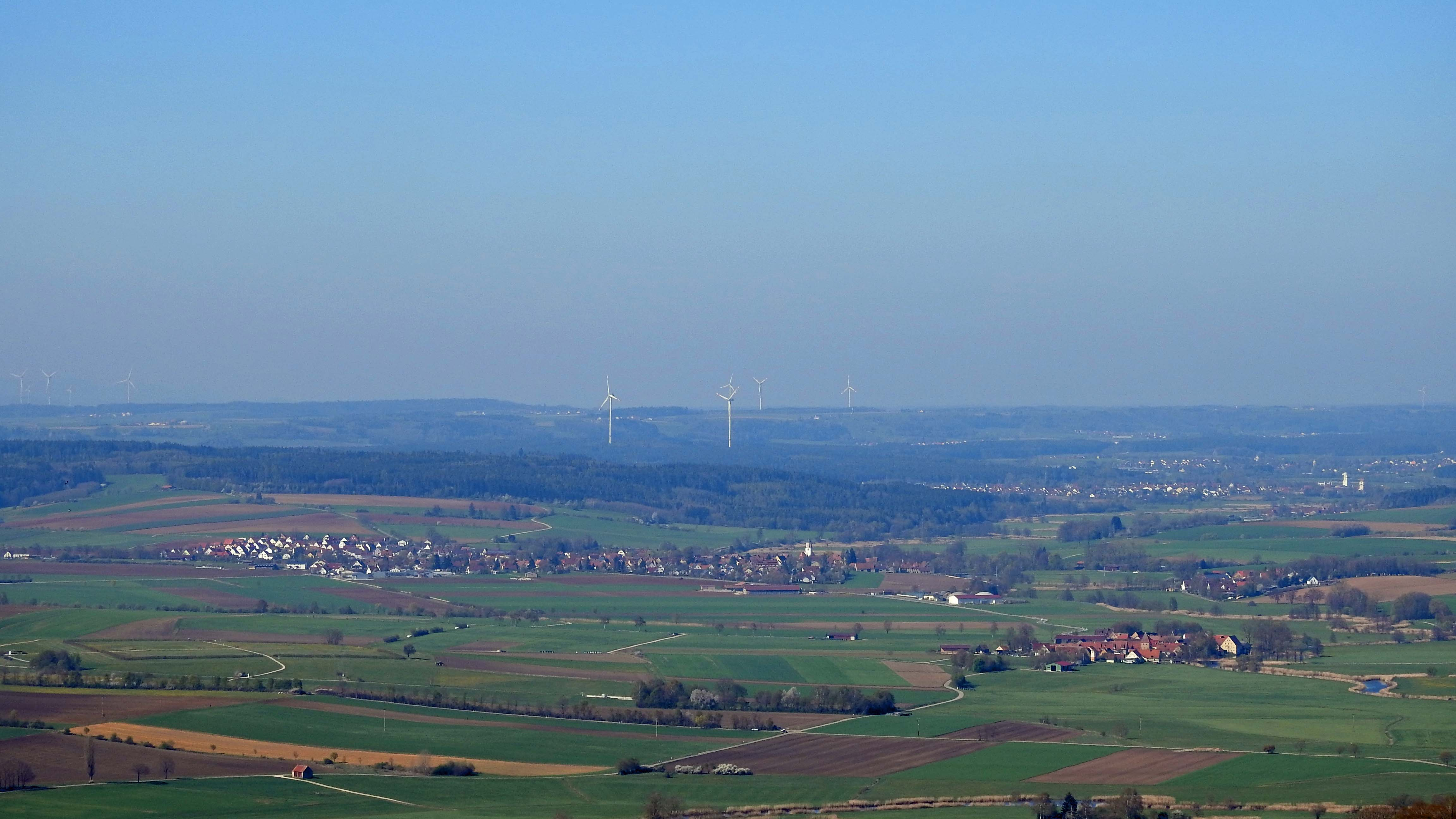 Blick vom Hesselberg auf Weiltingen und Wilburgstetten